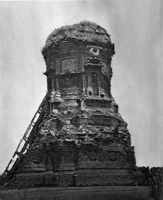 Foto. De Candi Jabung bij Probolinggo